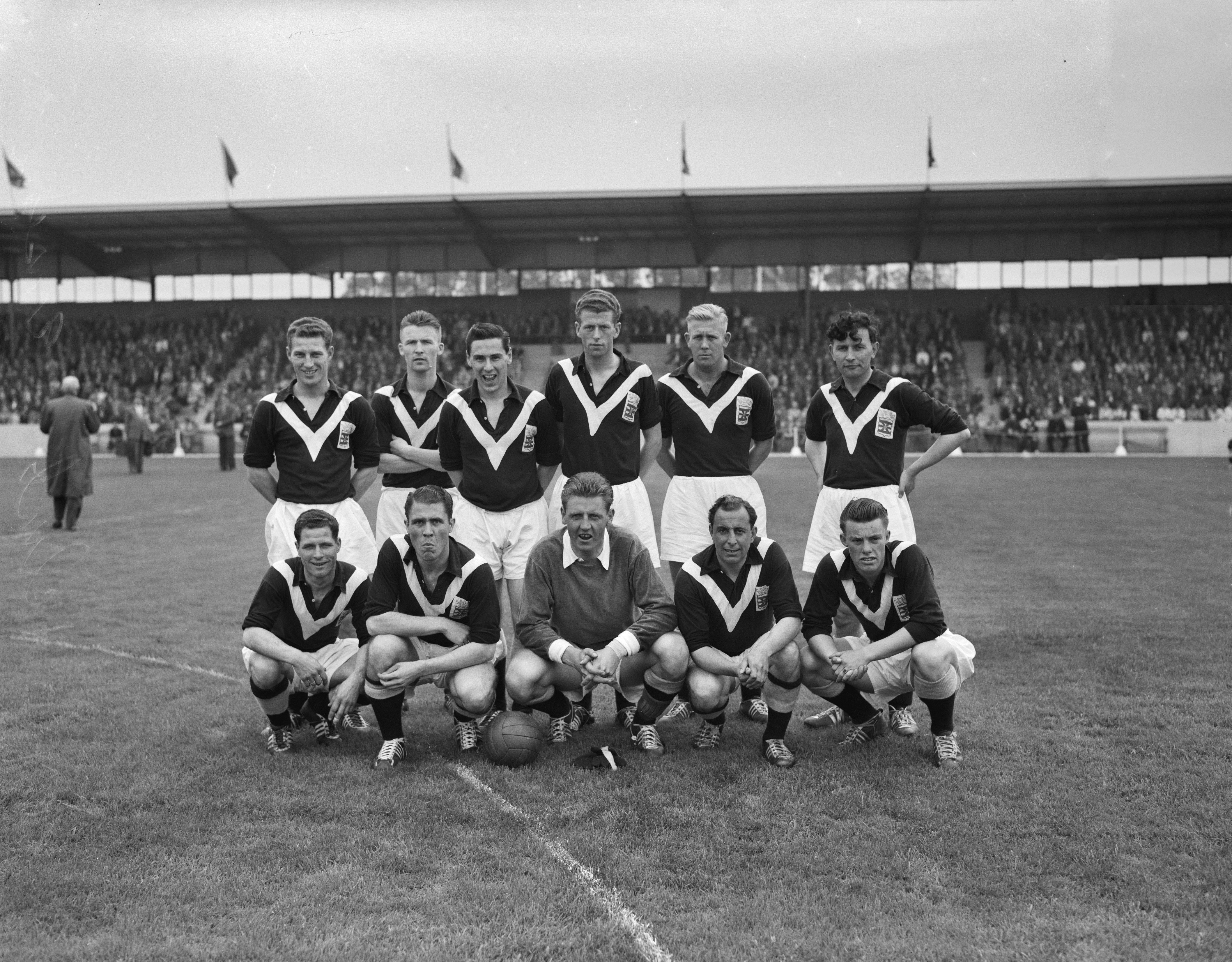 Collectie / Archief : Fotocollectie Anefo Reportage / Serie : [ onbekend ] Beschrijving : Voetbalelftallen. Enschede Datum : 2 september 1956 Locatie : Enschede Trefwoorden : Voetbalelftallen, sport Fotograaf : Sagers, Harry / Anefo Auteursrechthebbende : Nationaal Archief Materiaalsoort : Negatief (zwart/wit) Nummer archiefinventaris : bekijk toegang 2.24.01.04 Bestanddeelnummer : 907-9790